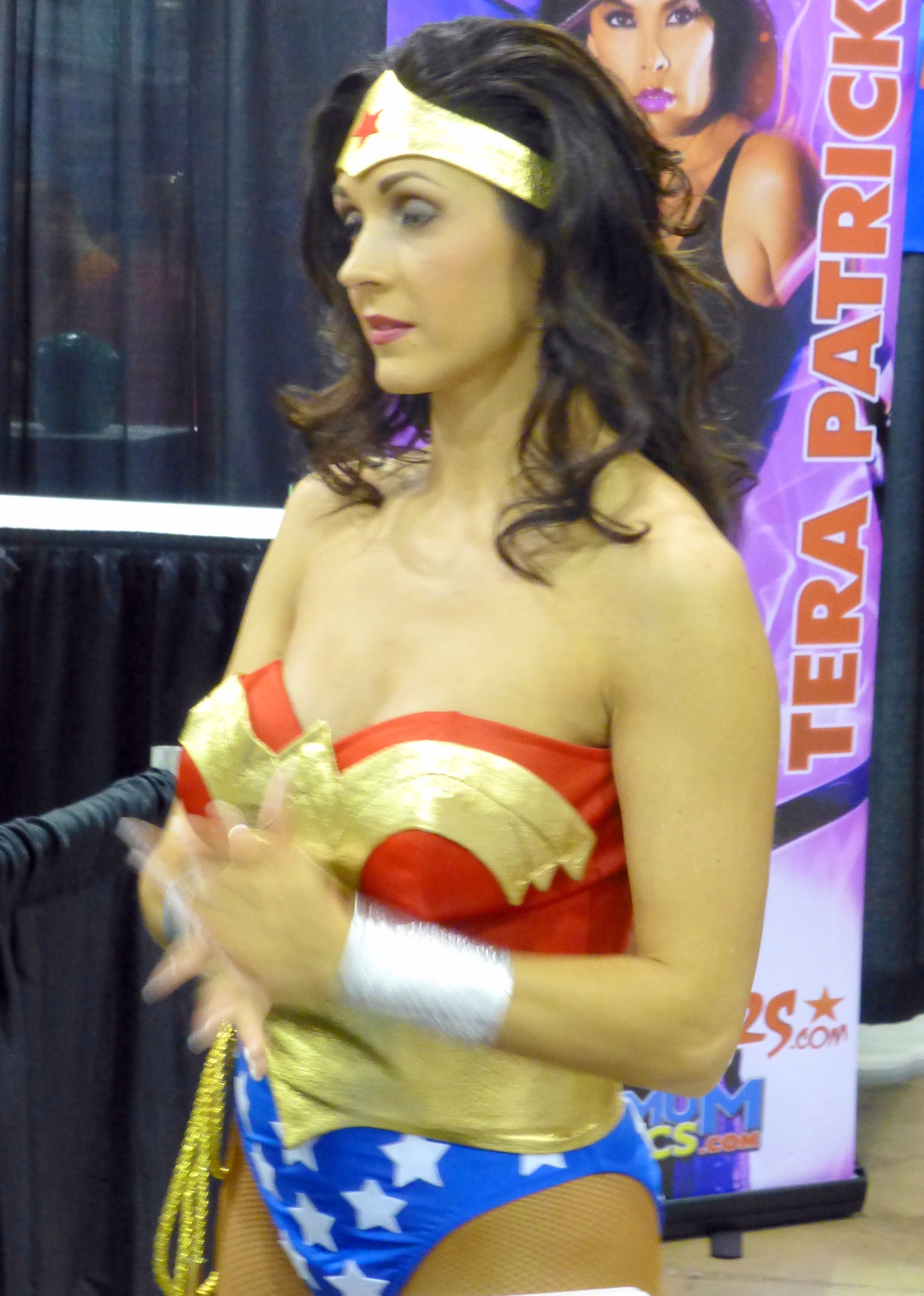 Taya Parker 01